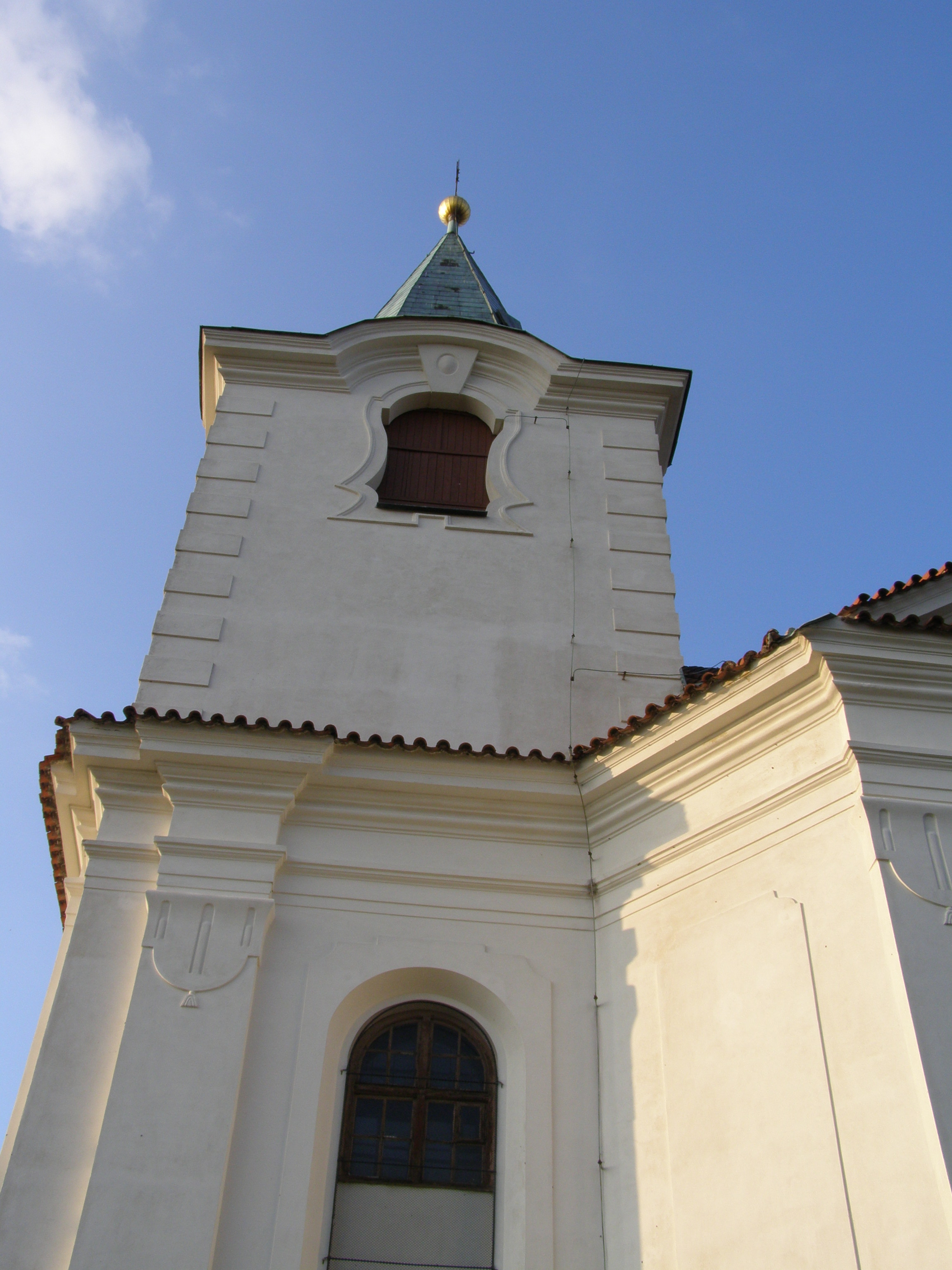 Praha, Kostel svatého Matěje